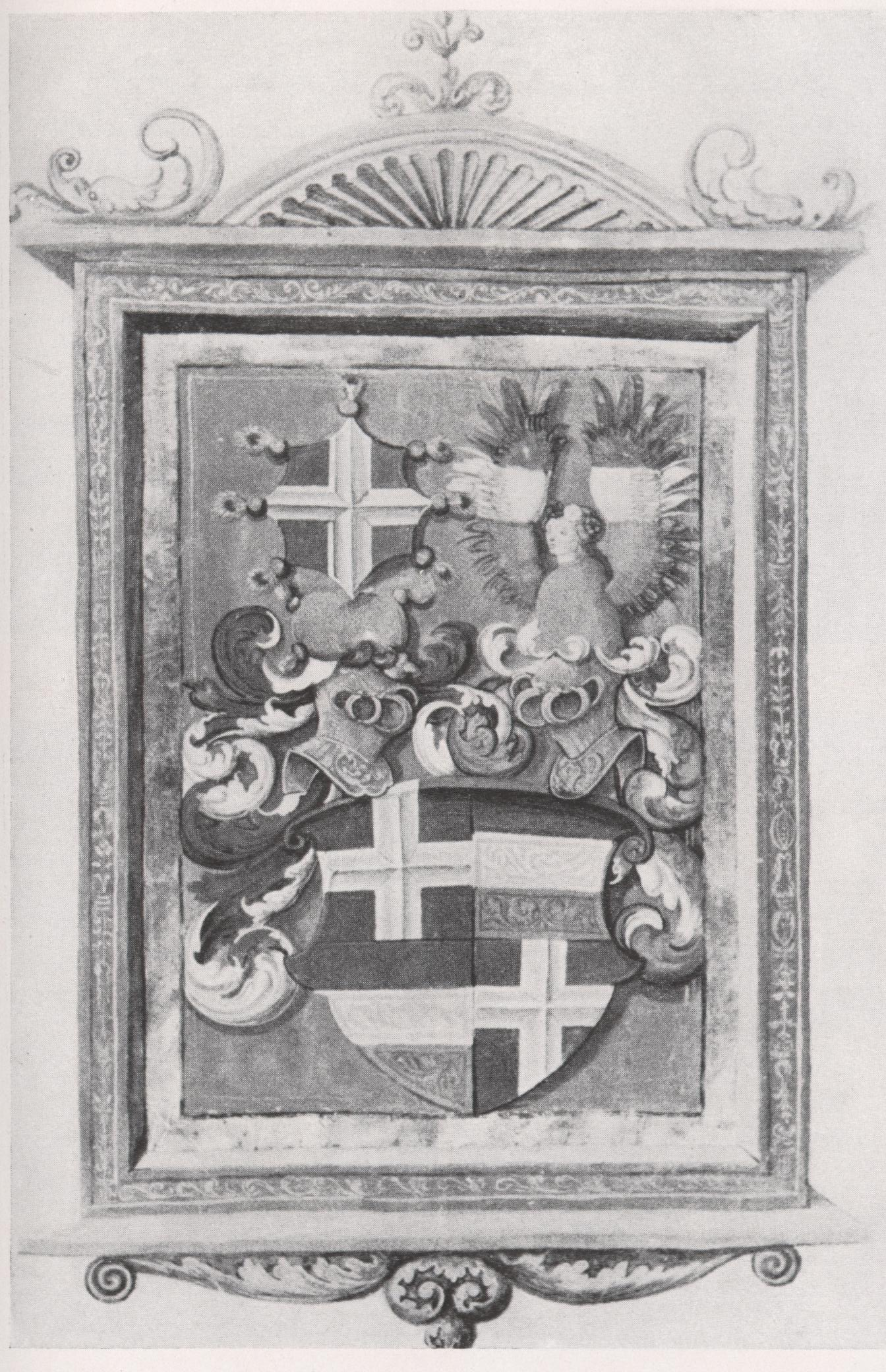 Bischof Phlipp von Flersheim, Speyer, Wappen